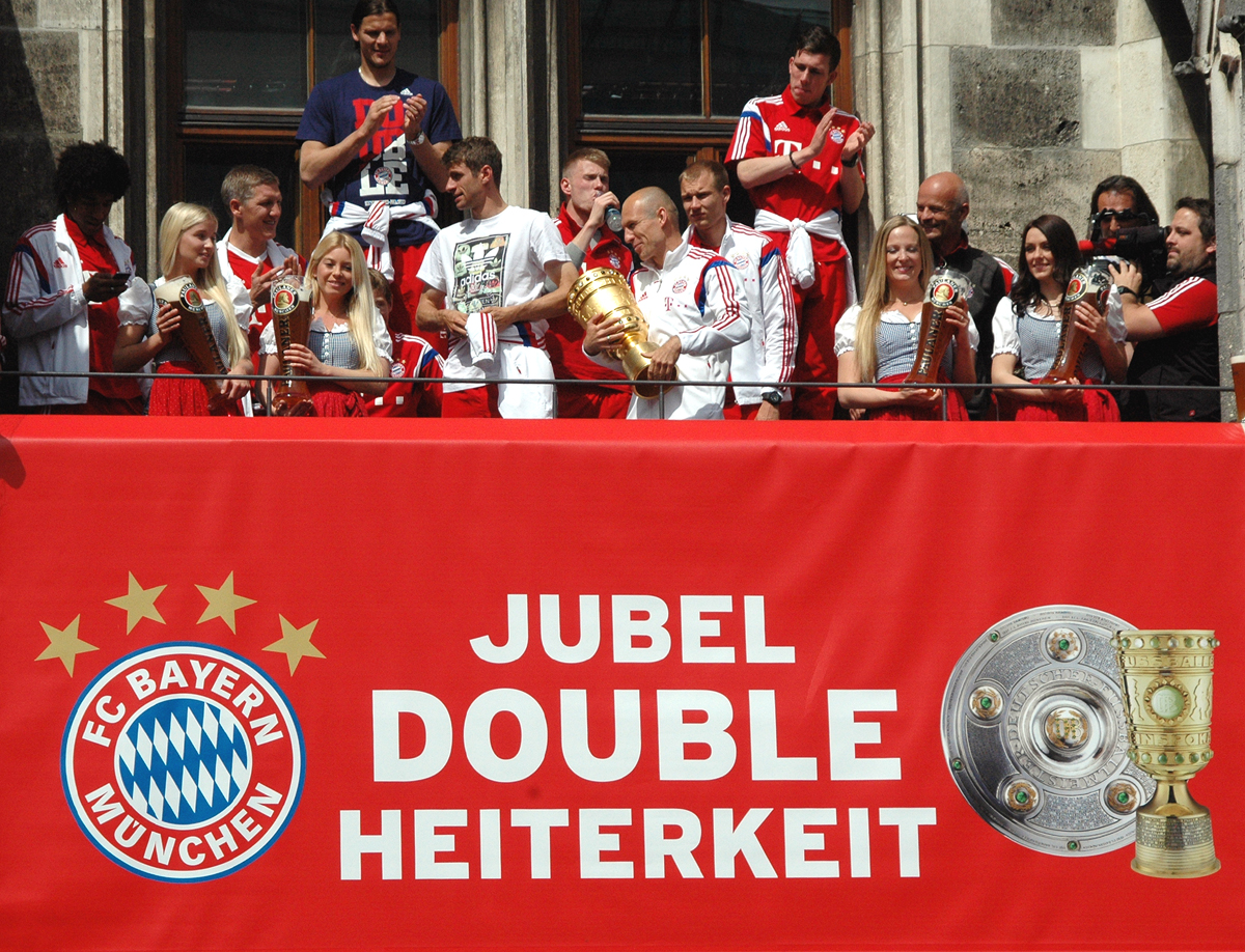 Double-Feier auf dem Balkon des Münchner Rathauses